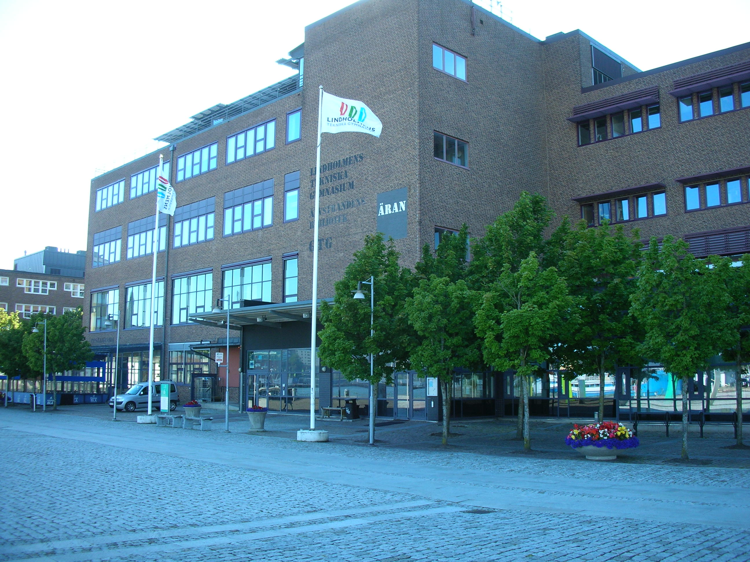 Lindholmens tekniska gymnasium.